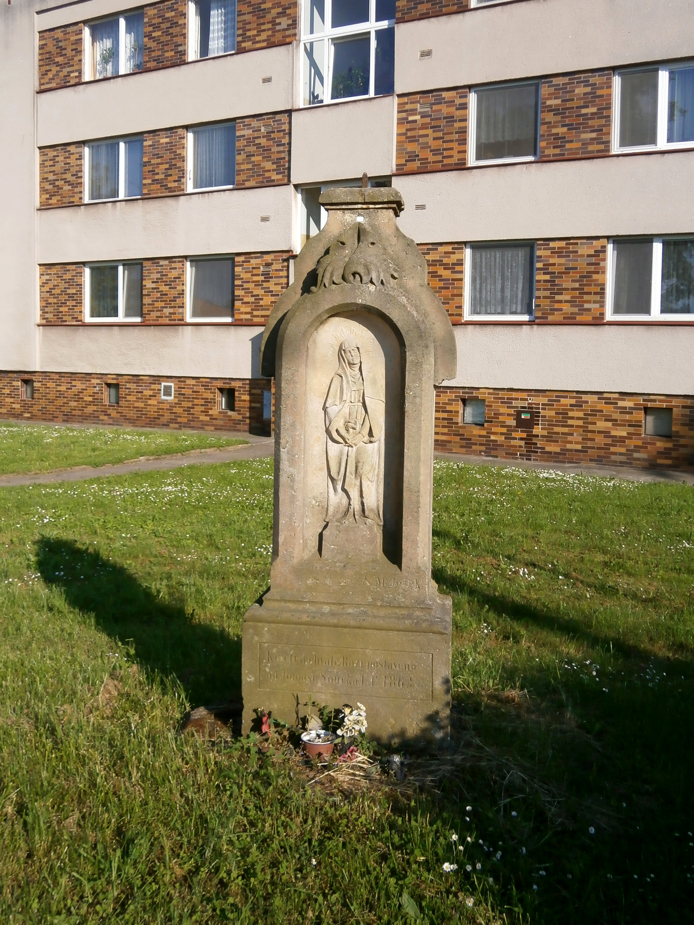 Sokl kříže ve Farářství